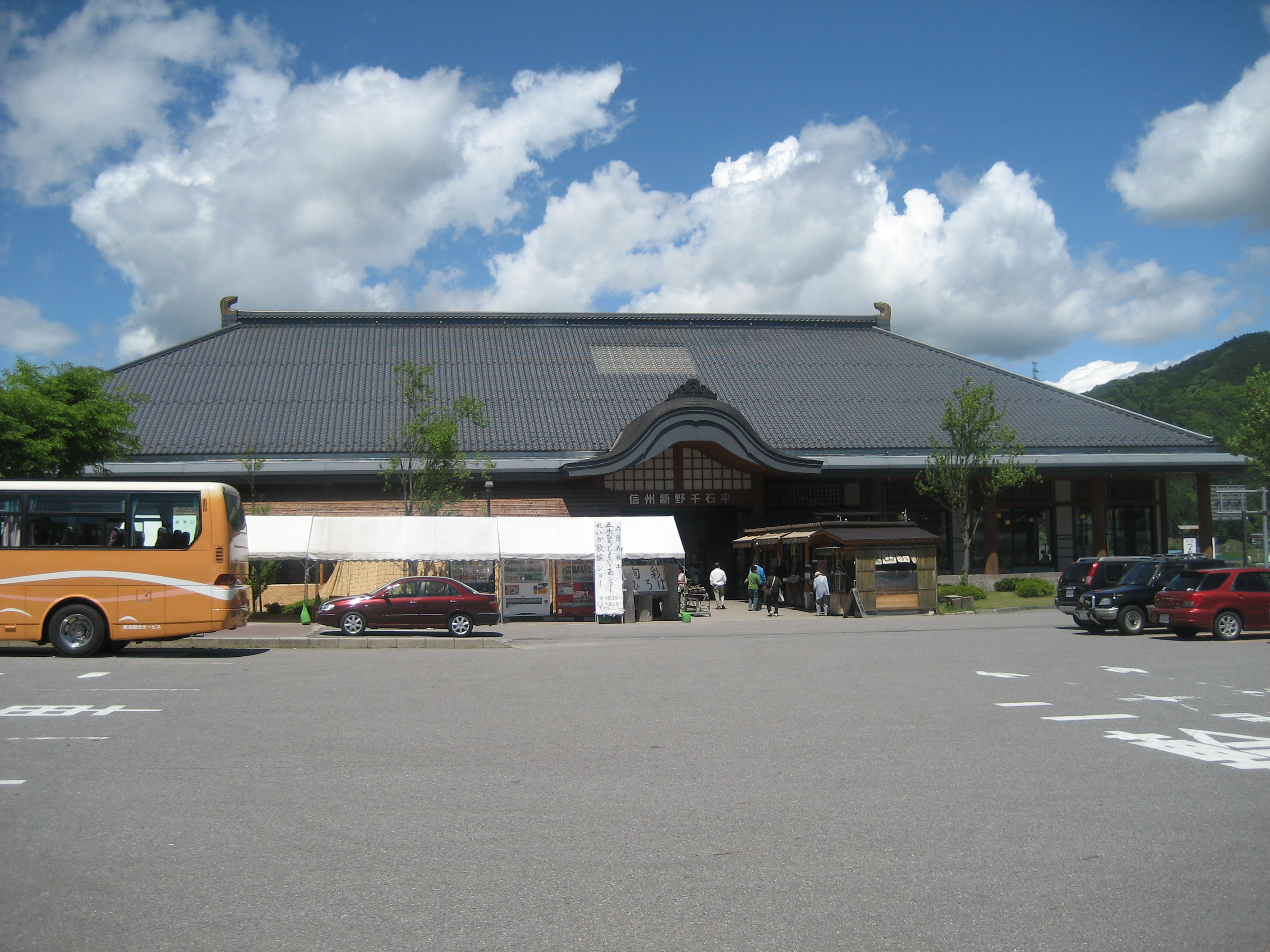 長野県下伊那郡阿南町道の駅信州新野千石平